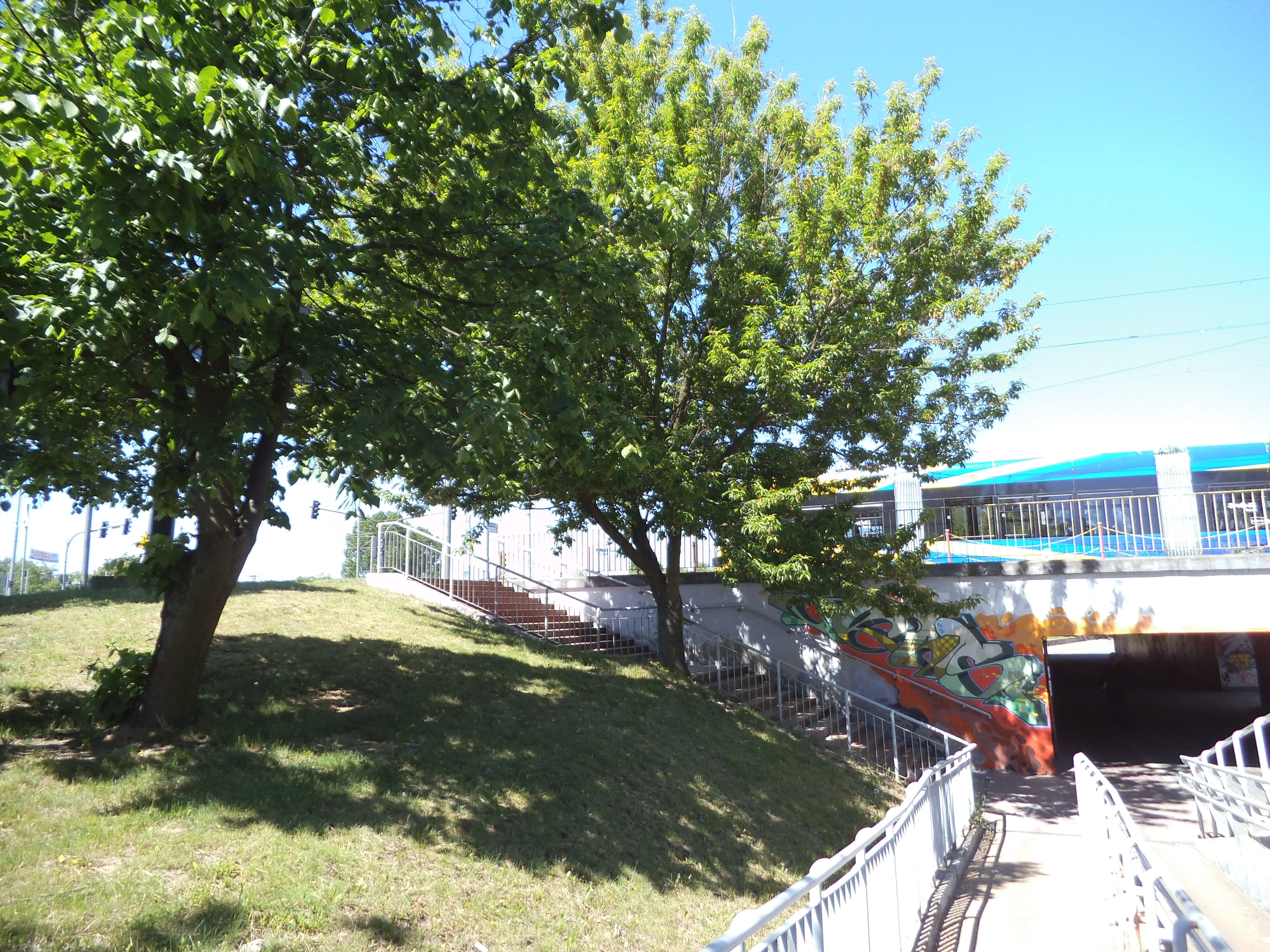 Przejście podziemne na Placu Skarbka w Toruniu